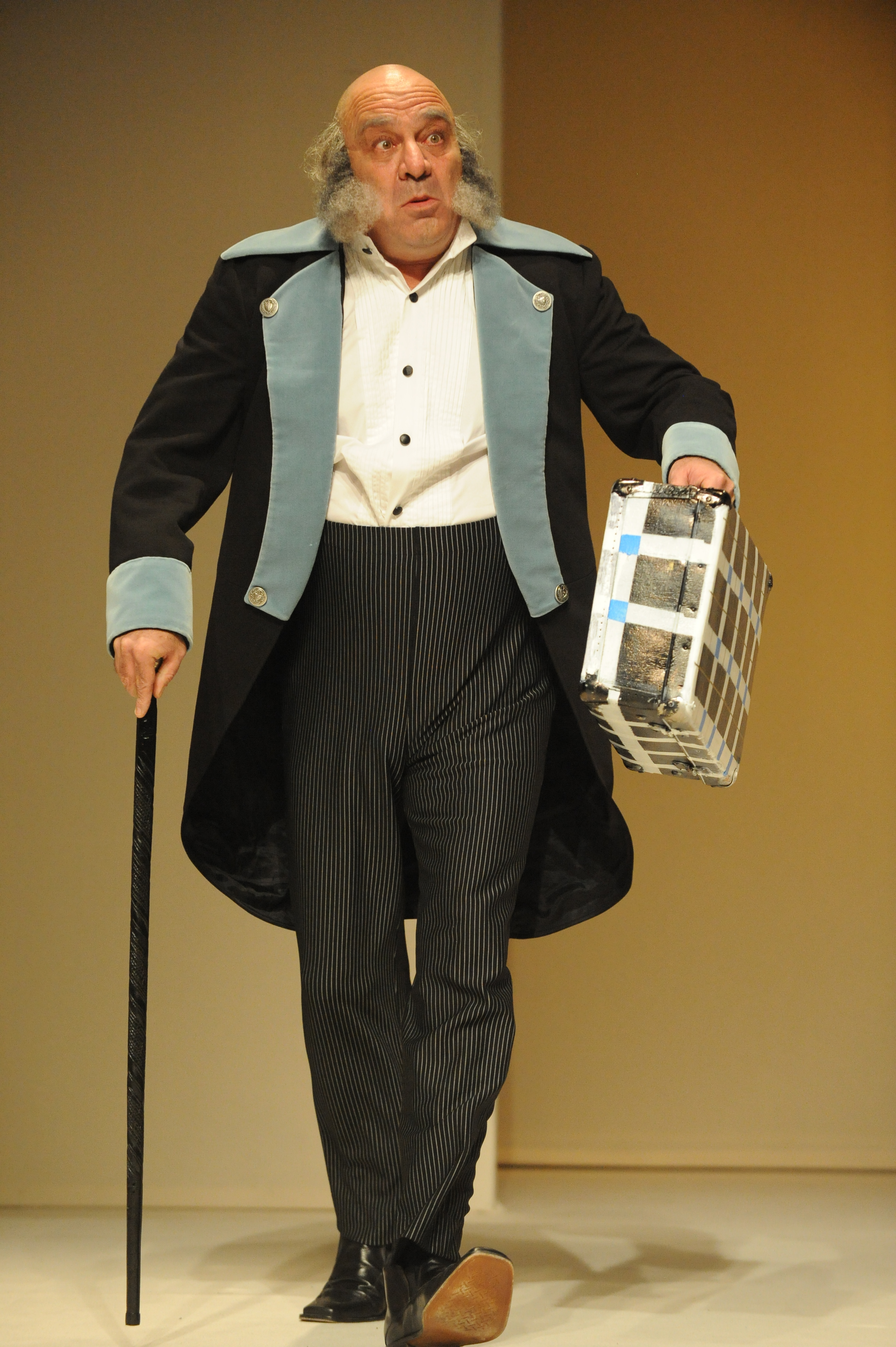 אריה צ'רנר ב"תעלולי סקפן", בבימויו של אודי בן-משה, תיאטרון החאן, 2010